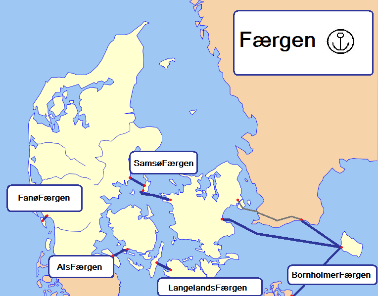 Færgen A/S